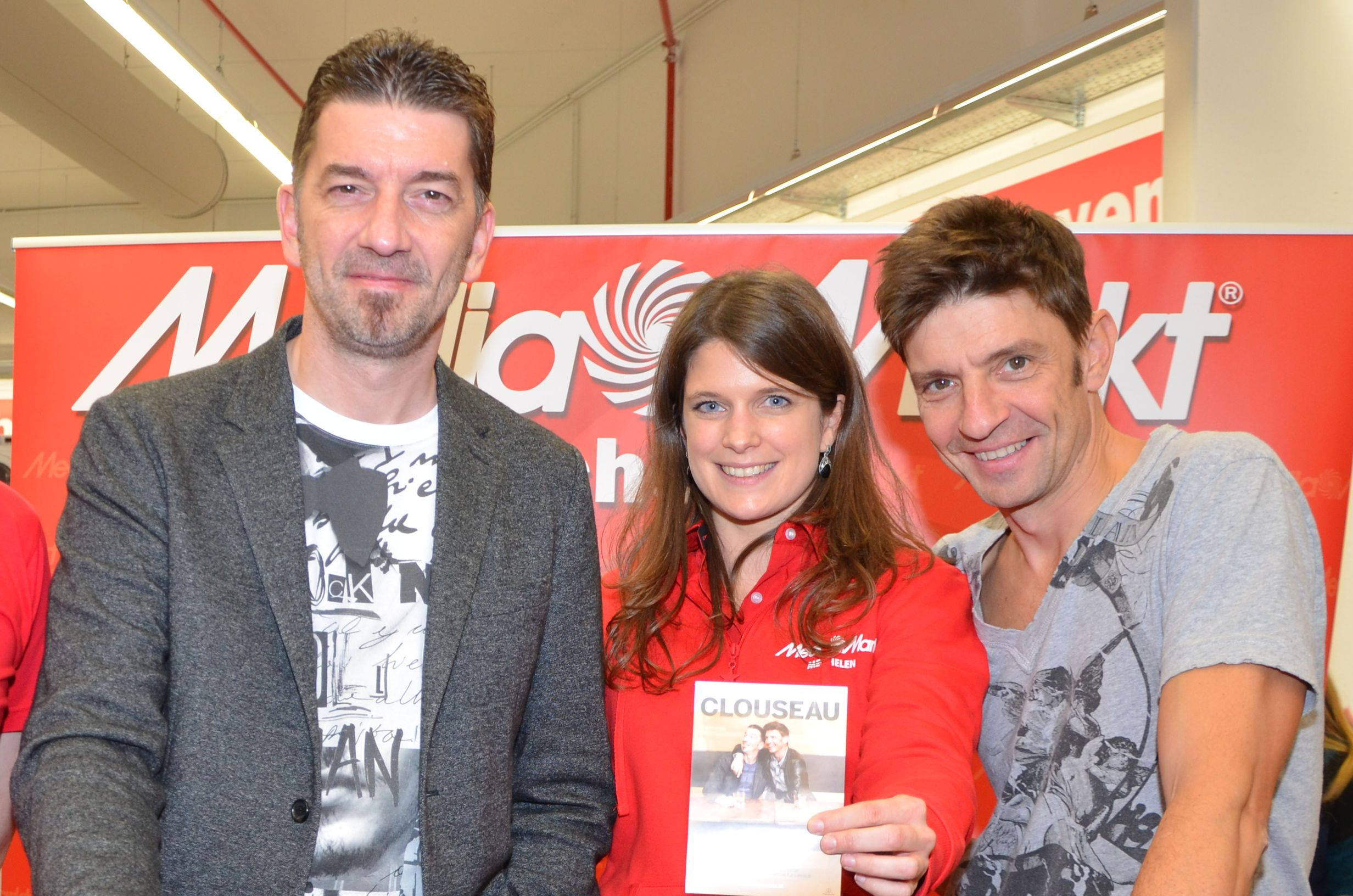 Clouseau (Kris Wauters en Koen Wauters) tijdens een handtekeningensessie in Media Markt Mechelen.